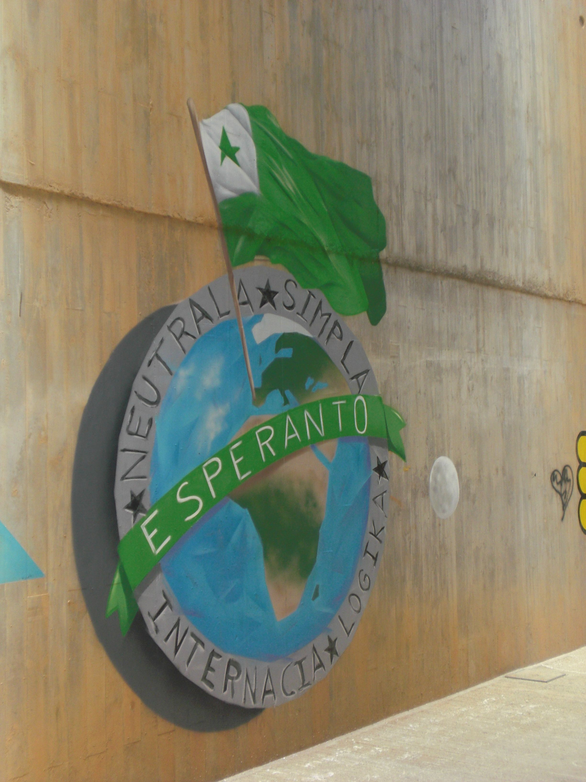 Murpentrajxo en Teruelo pri Esperanto